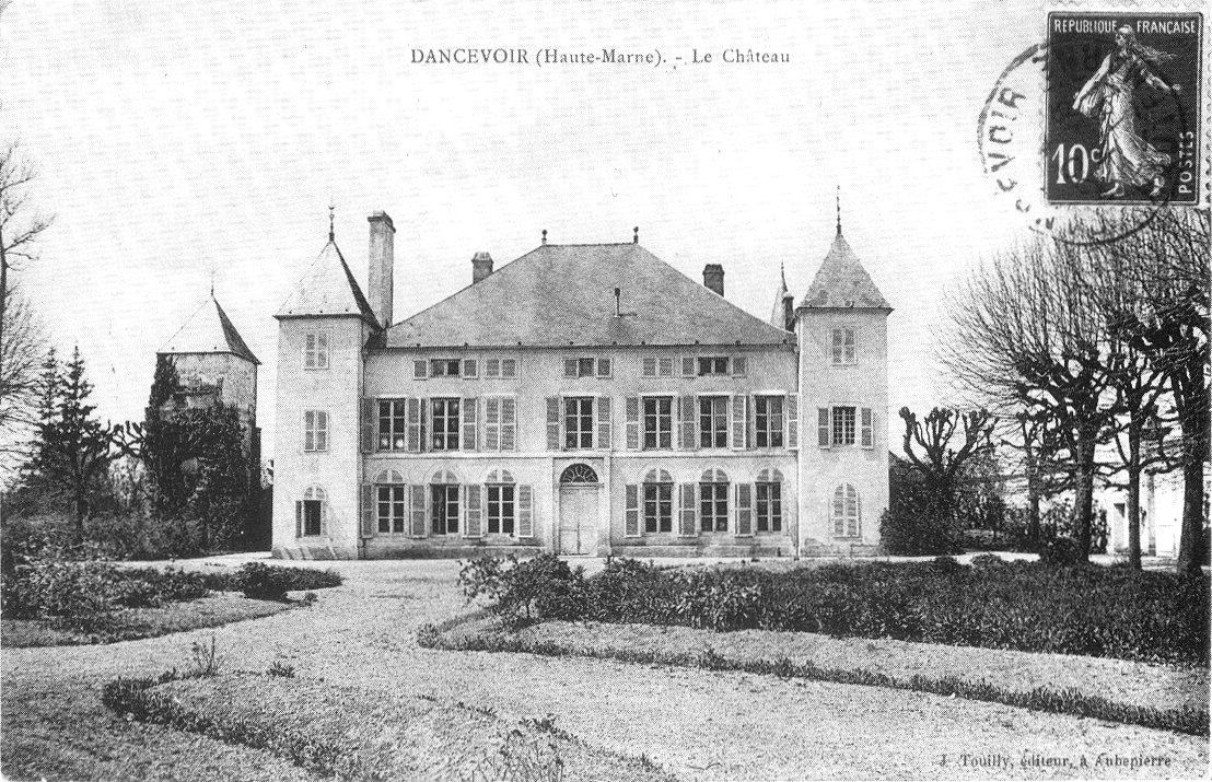 Carte postale ancienne Le château de Dancevoir, Haute-Marne, France